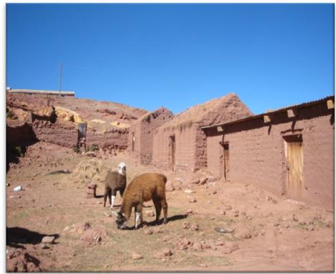 Una de las calles de San Pablo de Lípez, en el municipio del mismo nombre, en la Provincia de Sud Lípez, en el Departamento de Potosí, Bolivia